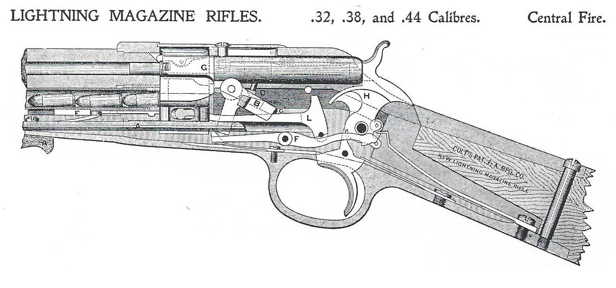 Colt M1855 Rifle Funktion